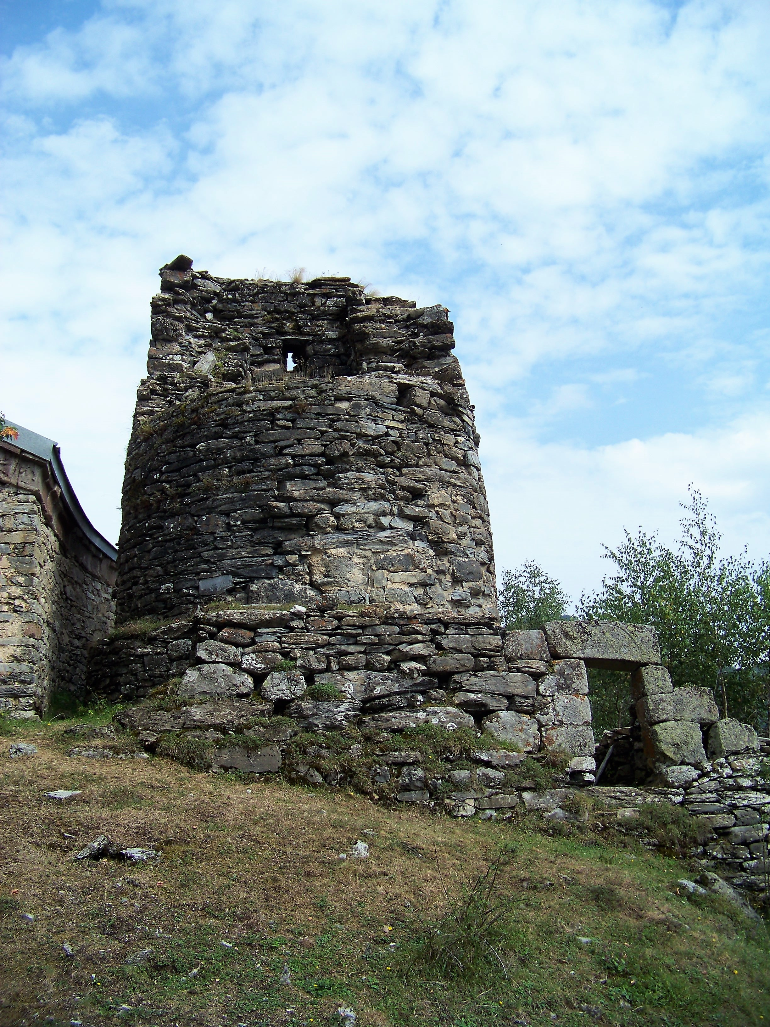 ზურგიანი კოშკი